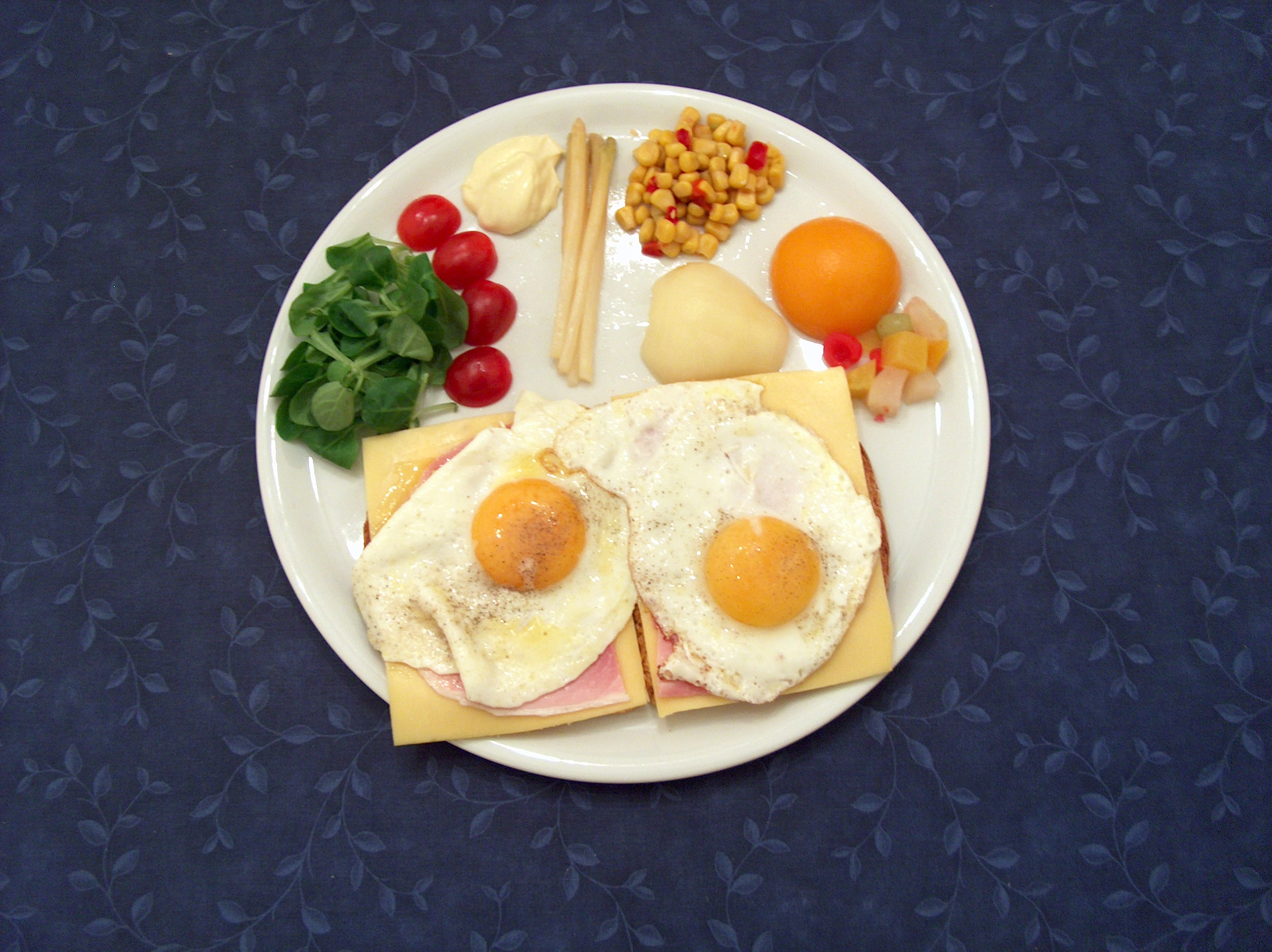 Uitsmijter, Belgique.